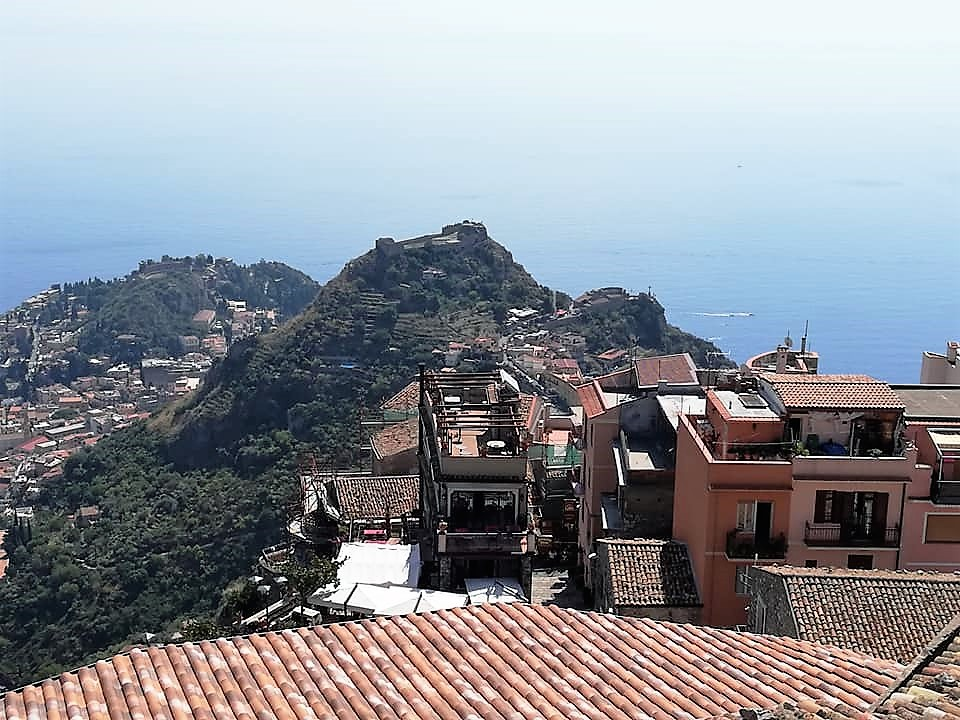 Panorama cittadino e castello di Taormina.